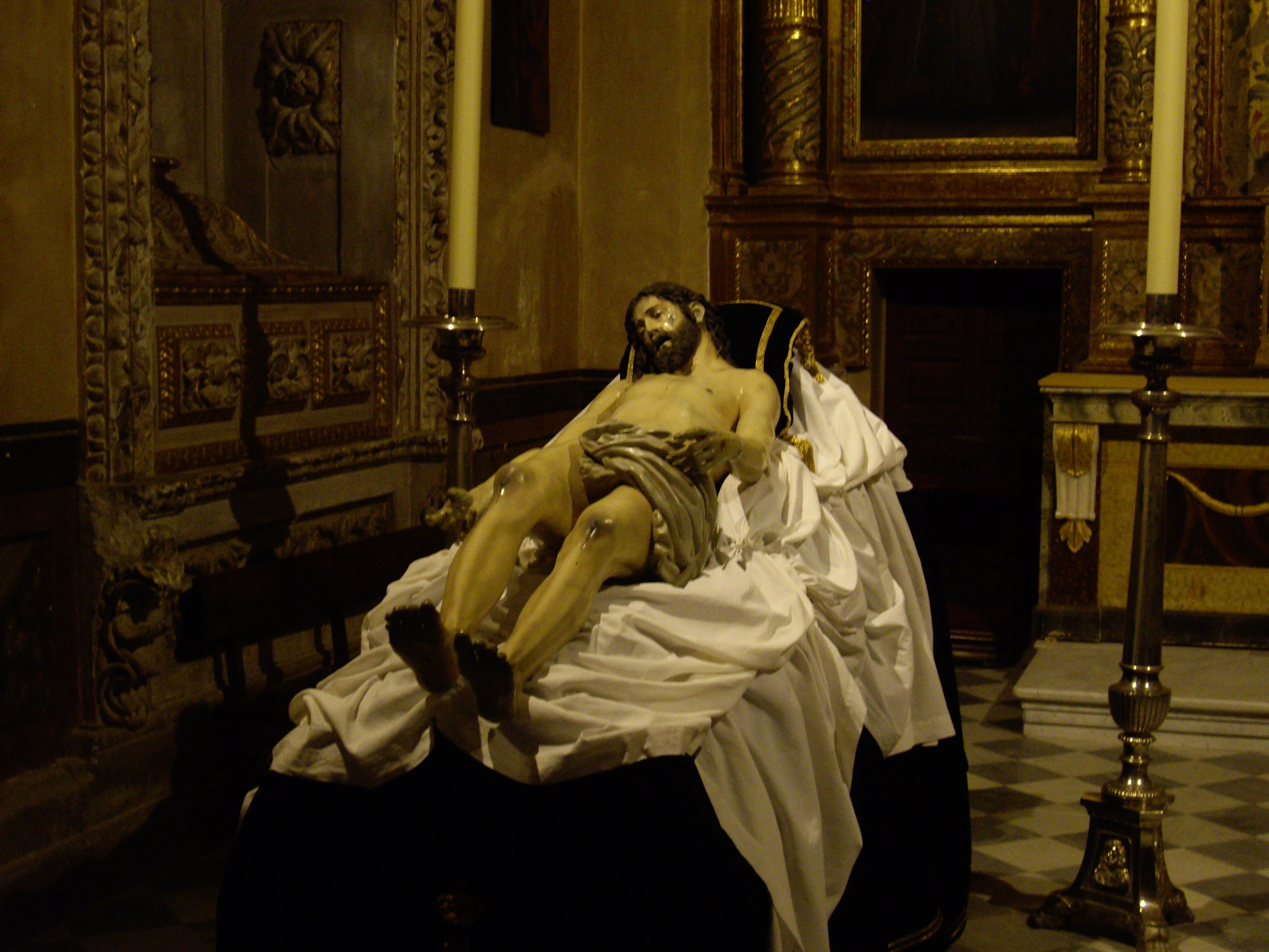 Cristo de la Urna, imagen de Luis Álvarez Duarte. S. I. Catedral de Zamora